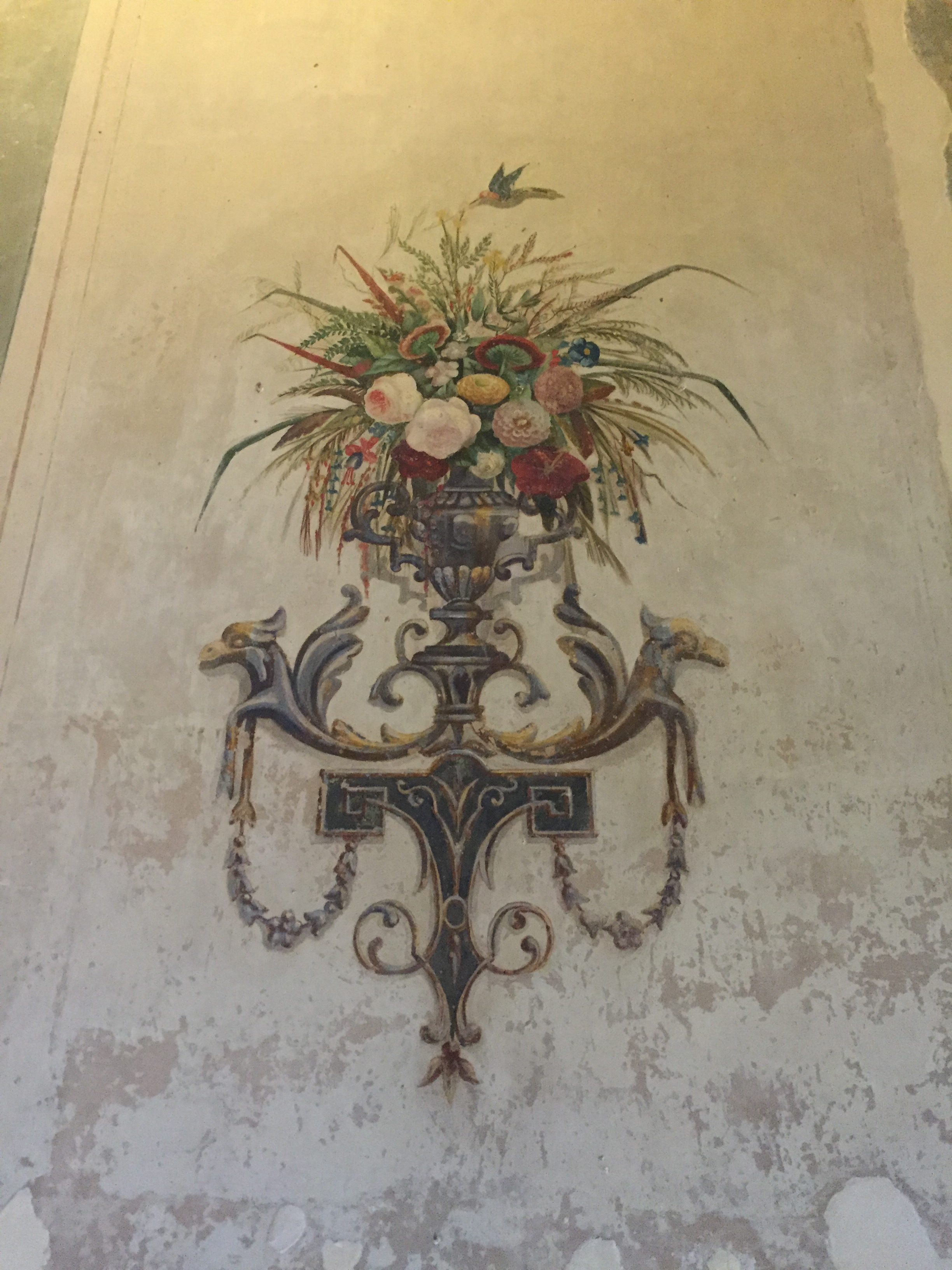 Decoração da parede dos cômodos do primeiro andar da Casa Número 1.